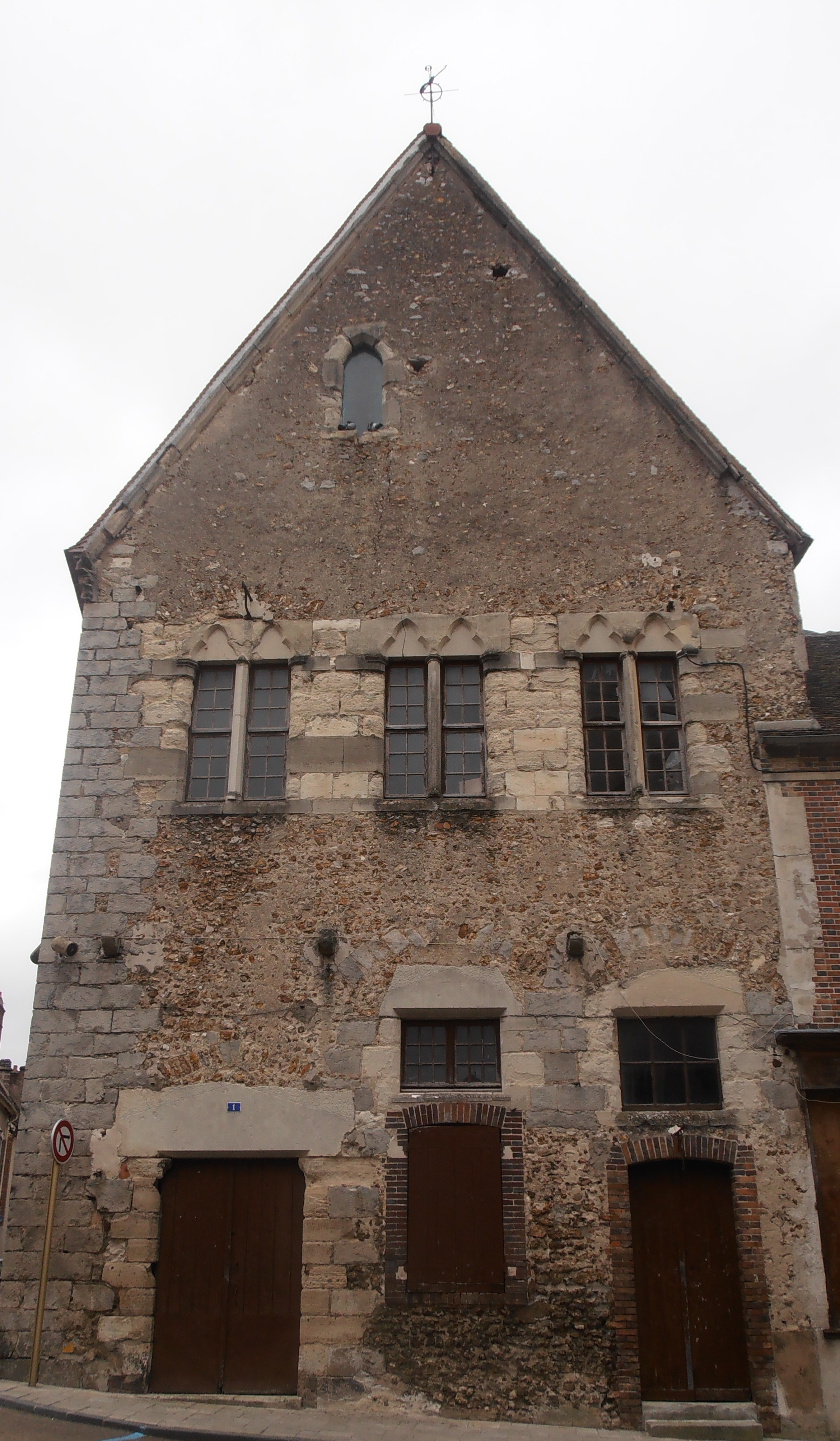 il s'agit de la maison du chapitre à saint julien du sault qui était la maison des chanoines qui représentaient l’évêque de Sens seigneur de Saint-Julien